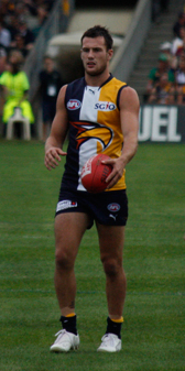 Chris Masten - Round 7 2009